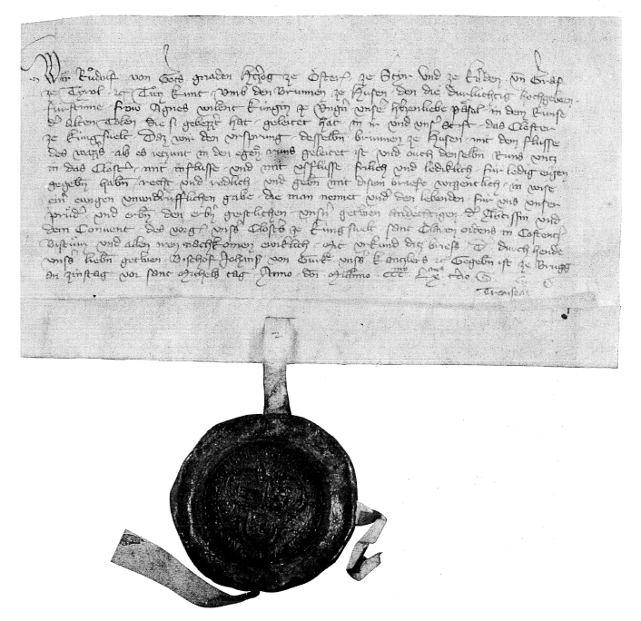 Urkunde Herzog Rudolfs IV von Österreich aus dem Jahr 1363 Aus dieser Urkunde geht hervor, dass Herzog Rudolf IV von Österreich die wasserführende römische / mittelalterliche Wasserleitung von Hausen nach Windisch (ehem. Vindonissa) dem Kloster Königsfelden von "der Quelle bis zum Brunnen" schenkte. Ausserdem kann man daraus entnehmen, dass die Königin Agnes die Leitung einst ausbessern liess.